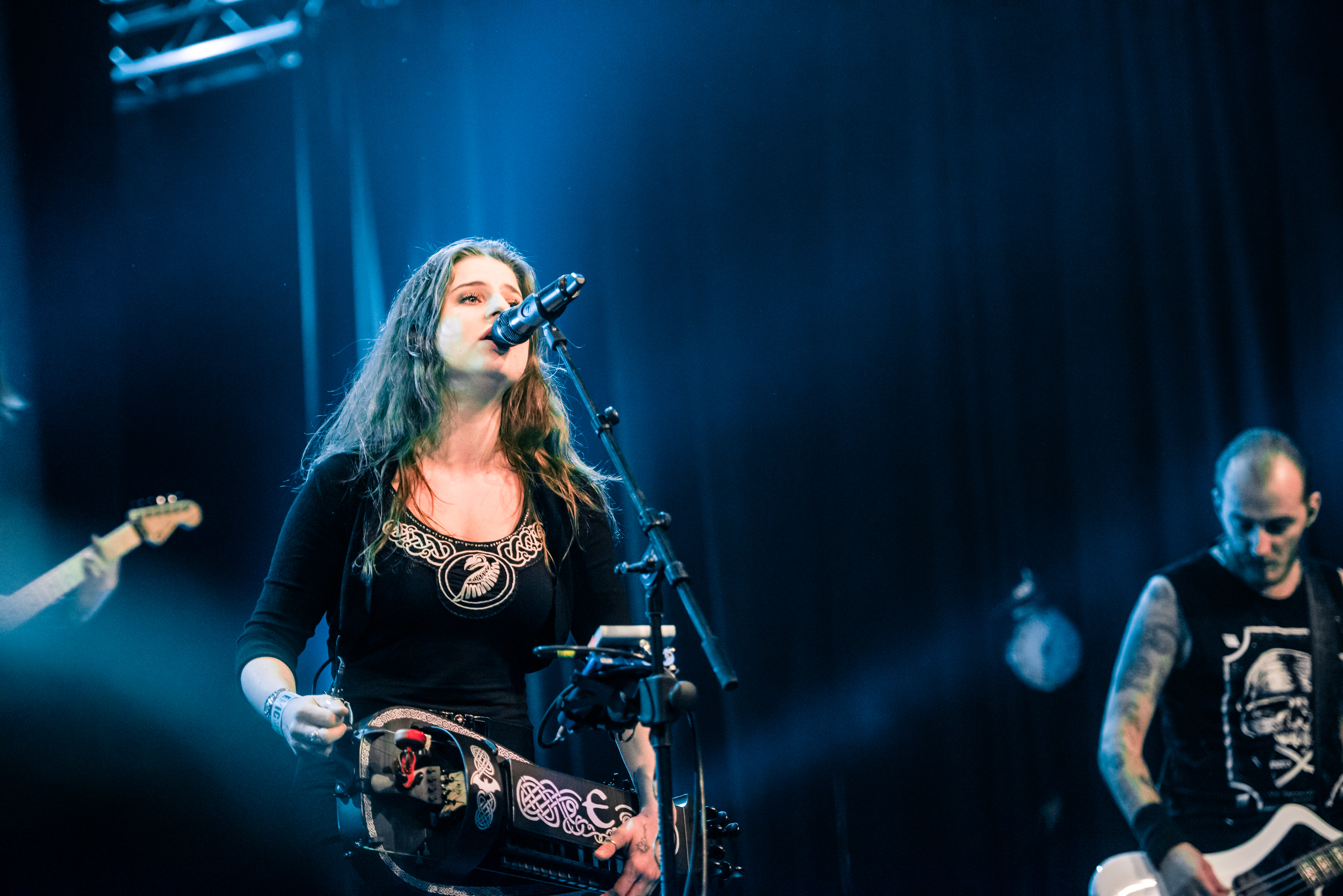 'Eluveitie - Epic Metal Fest - Eindhoven'